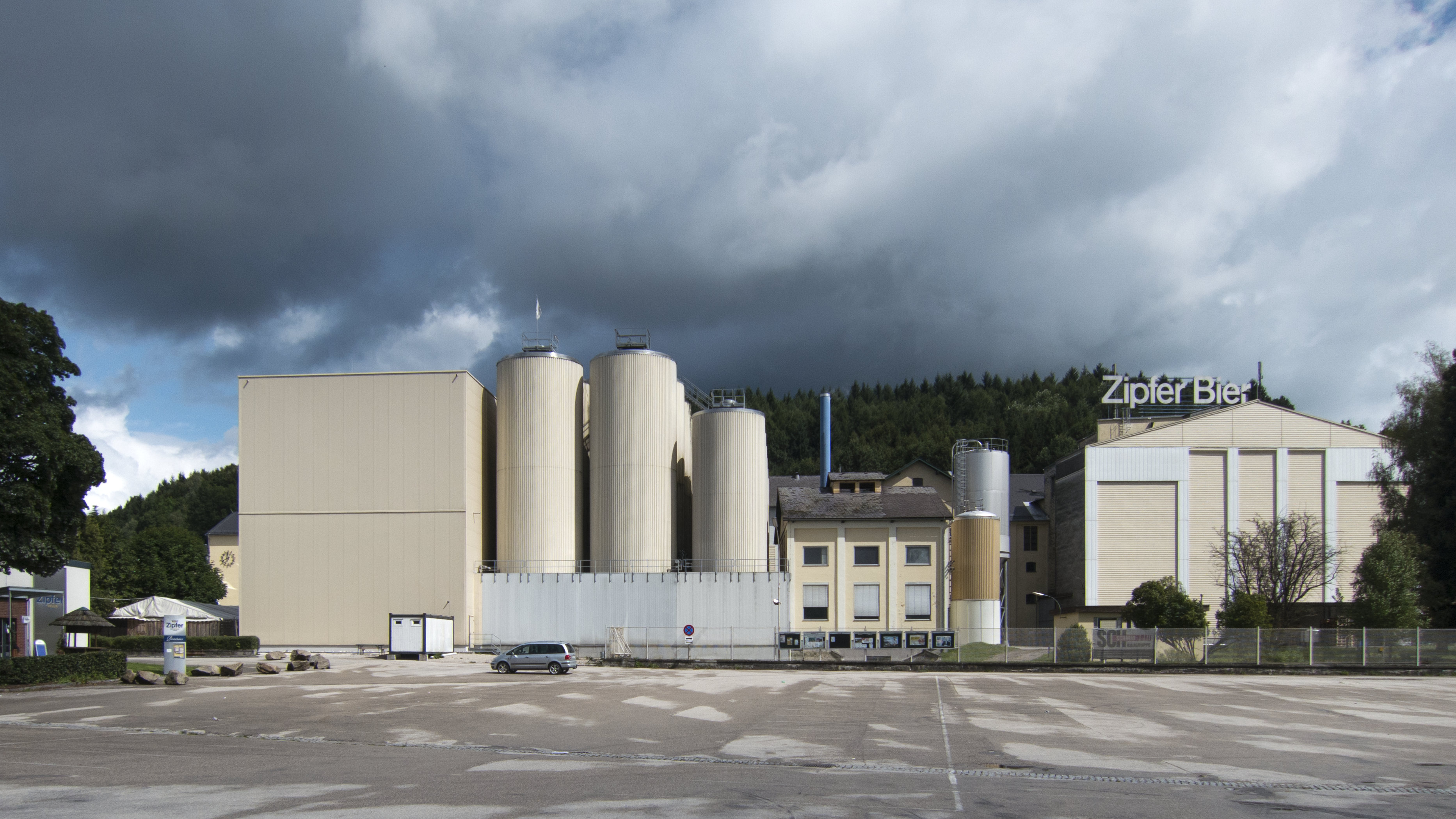 Brauerei Zipf